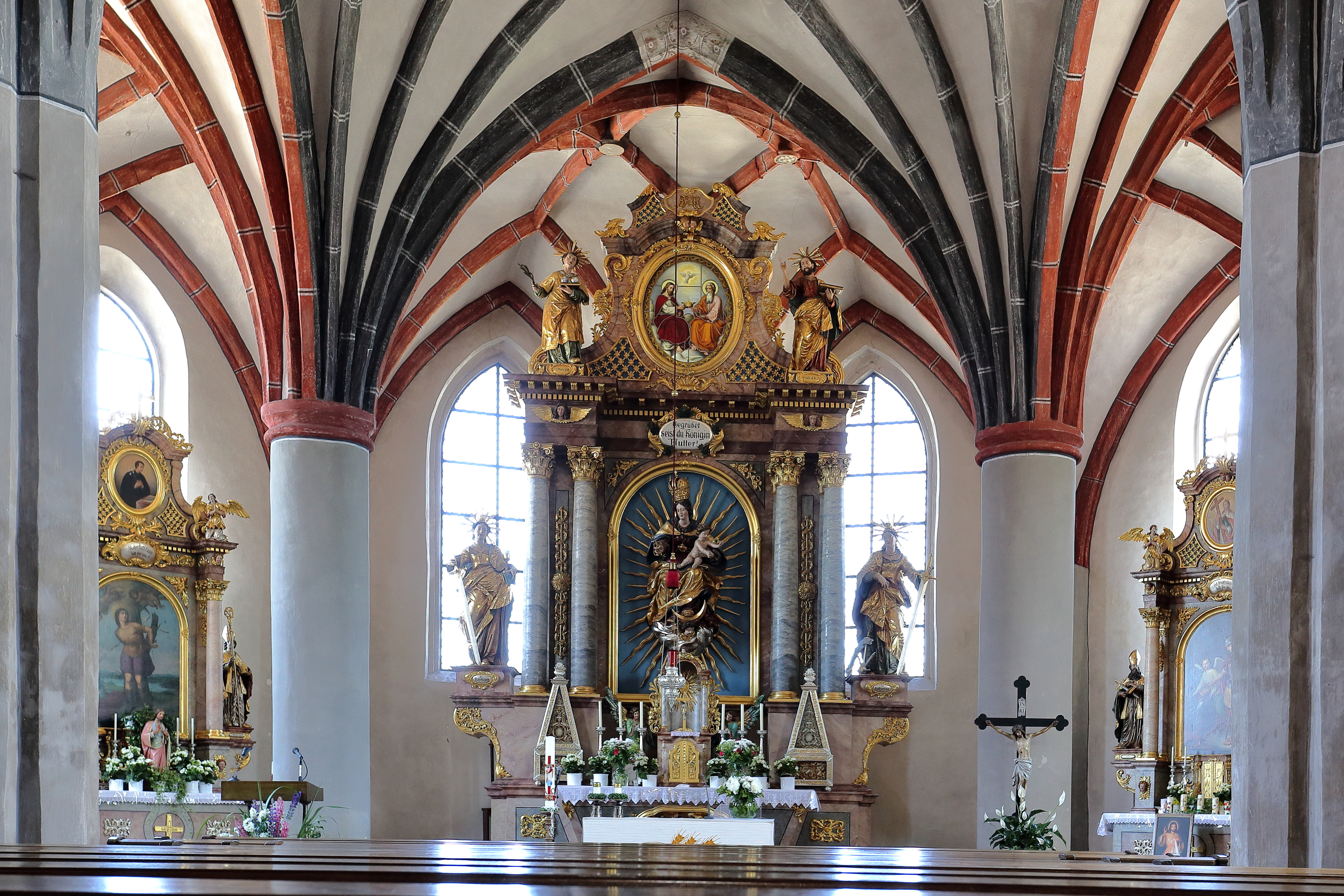 Innenansicht der katholischen Pfarrkirche Mariä Himmelfahrt in der oberösterreichischen Gemeinde Pischelsdorf am Engelbach. Der Hochaltar und die Seitenaltäre entstanden unter Verwendung älterer Teile 1850/1851 und wurden von dem Salzburger Tischler Johann Peschke gefertigt. Die Seitenaltarbilder (hl. Sebastian, hl. Florian) sind aus dem Jahr 1851 und Werke des Salzburger Malers Sebastian Stief.